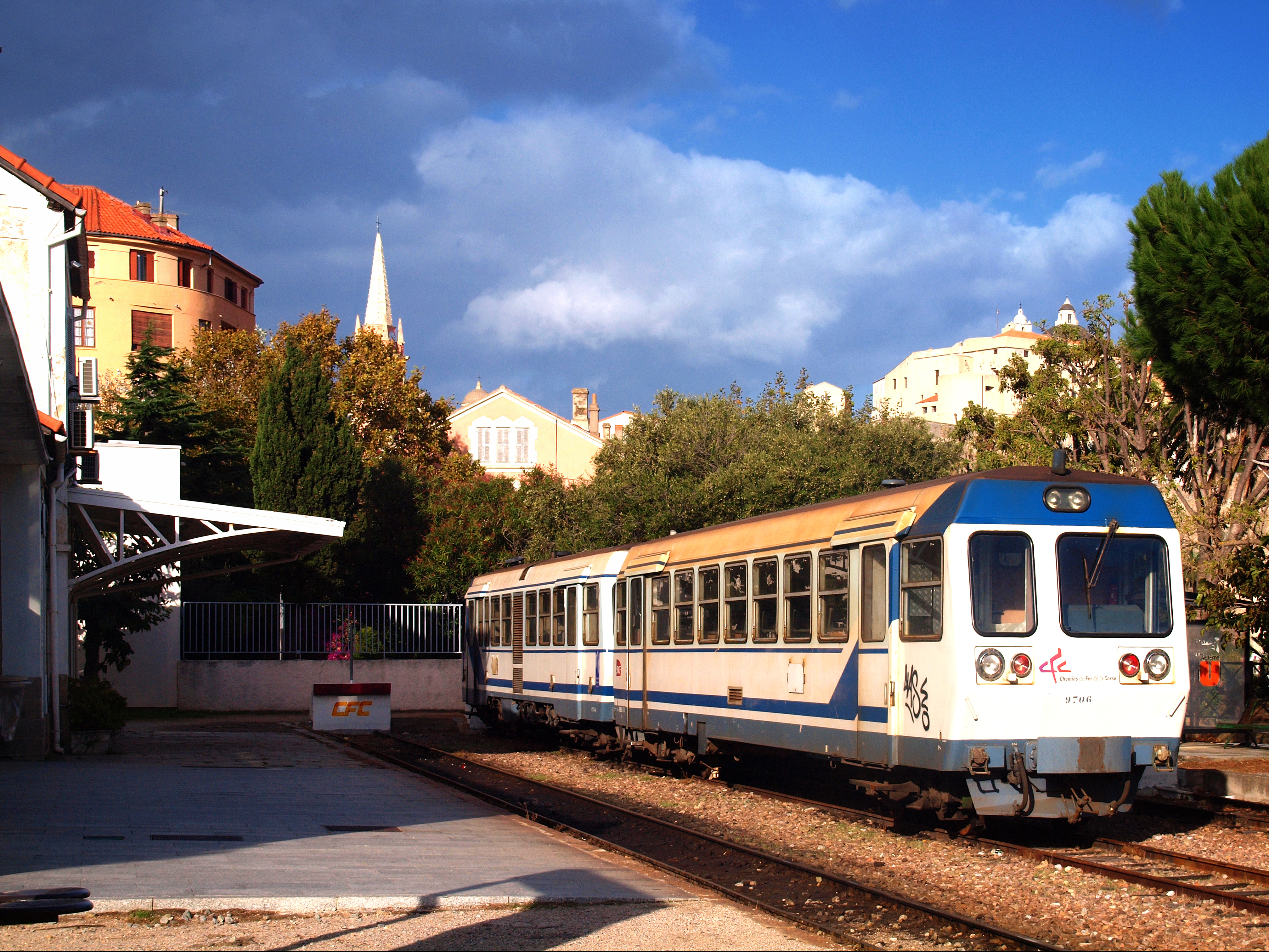 Calvi (Corsica) - La gare